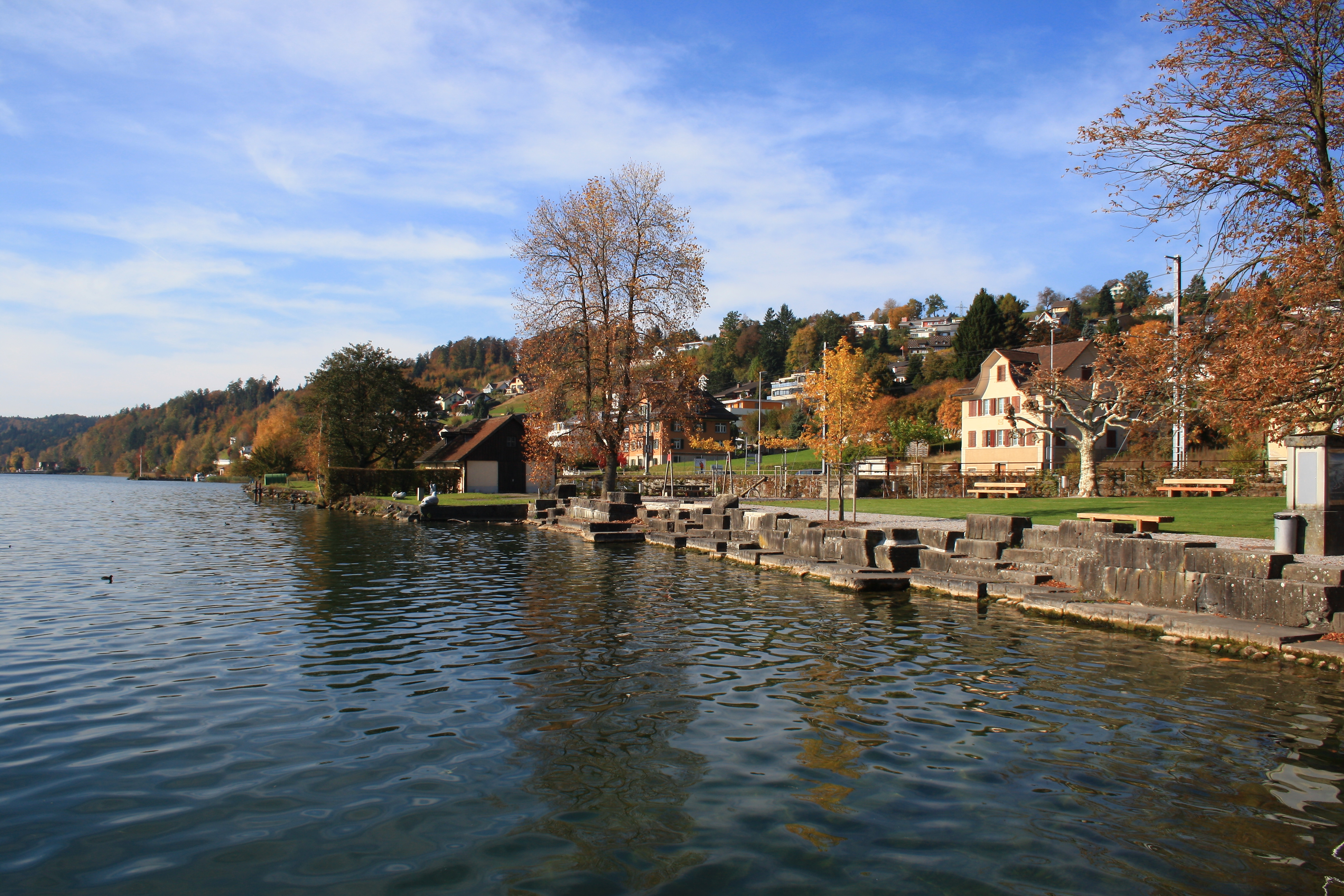 On Obersee (upper Lake Zürich) shore in Schmerikon